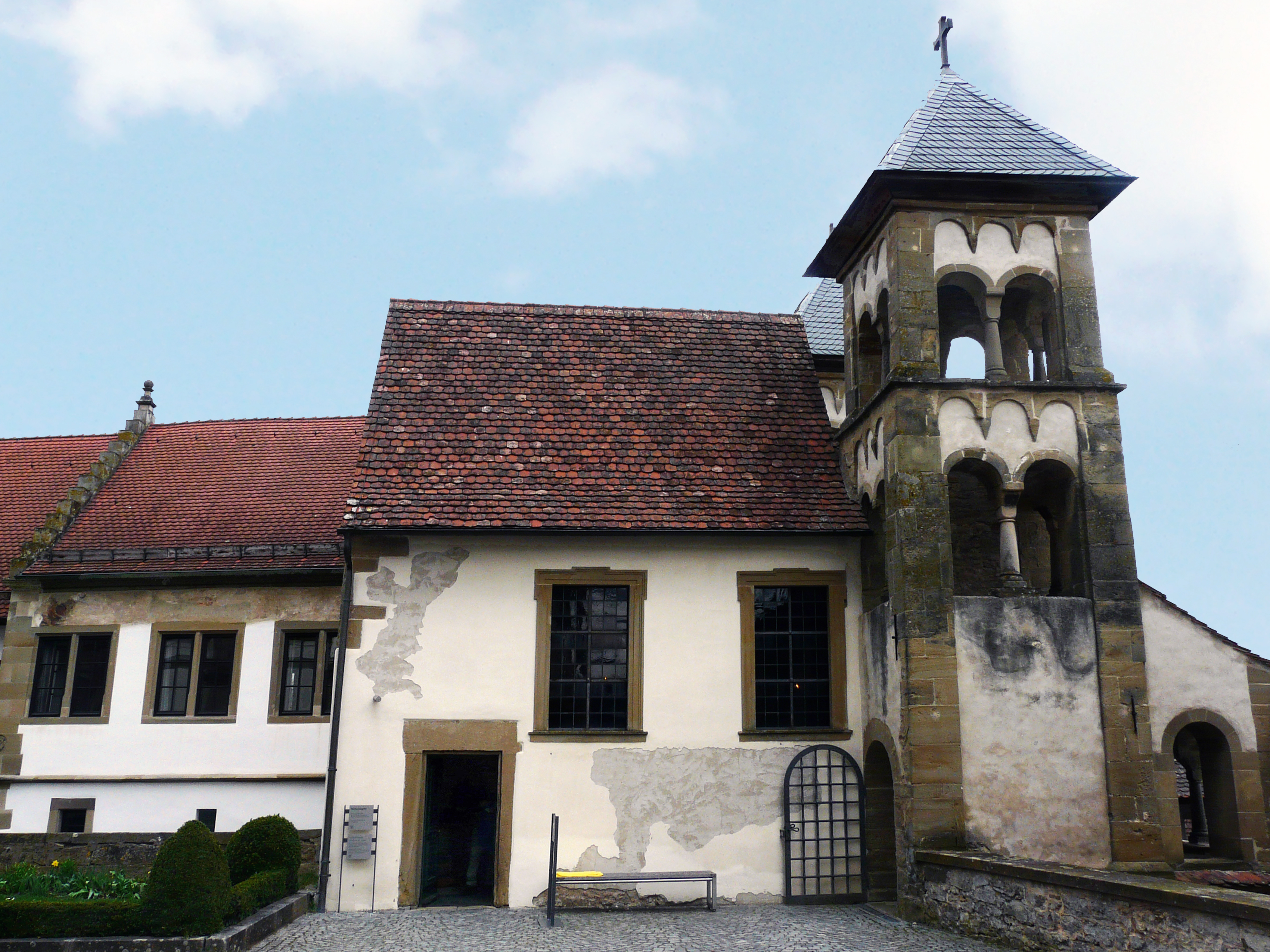 Капелла Св. Михаила